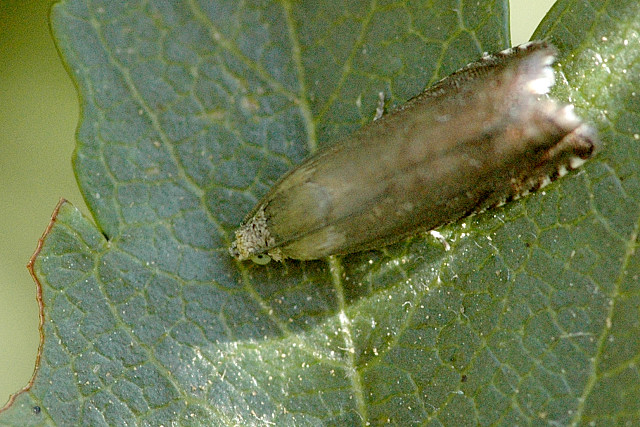 Picture taken in Commanster, Belgian High